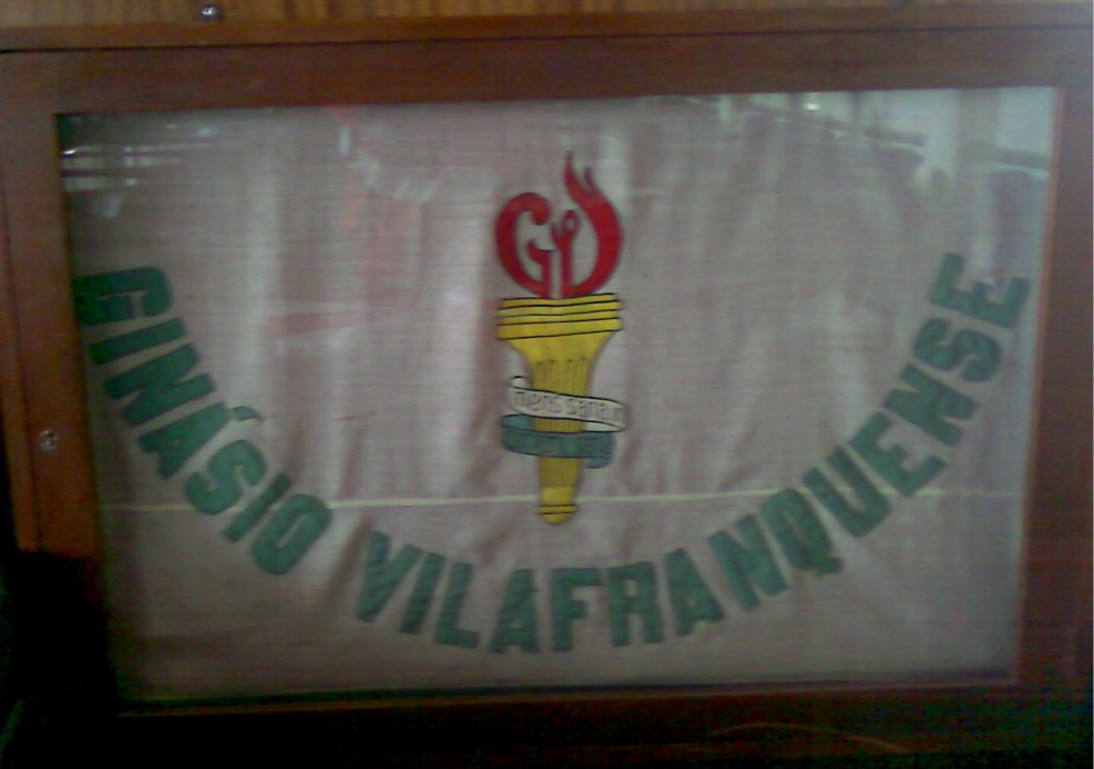 Bandeira do Ginásio Vilafranquense exposta na sala de troféus do União Desportiva vilafranquense